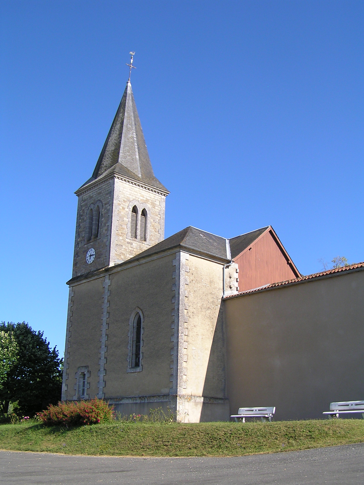 église d'Ebréon